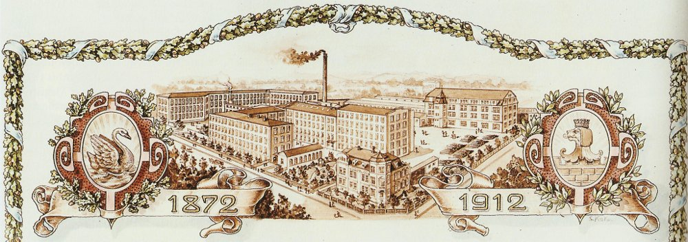 Erlangen. Bürstenfabrik Emil Kränzlein in der Östlichen Stadtmauerstraße. Zeichnung aus dem Jubiläumsalbum der Firma.